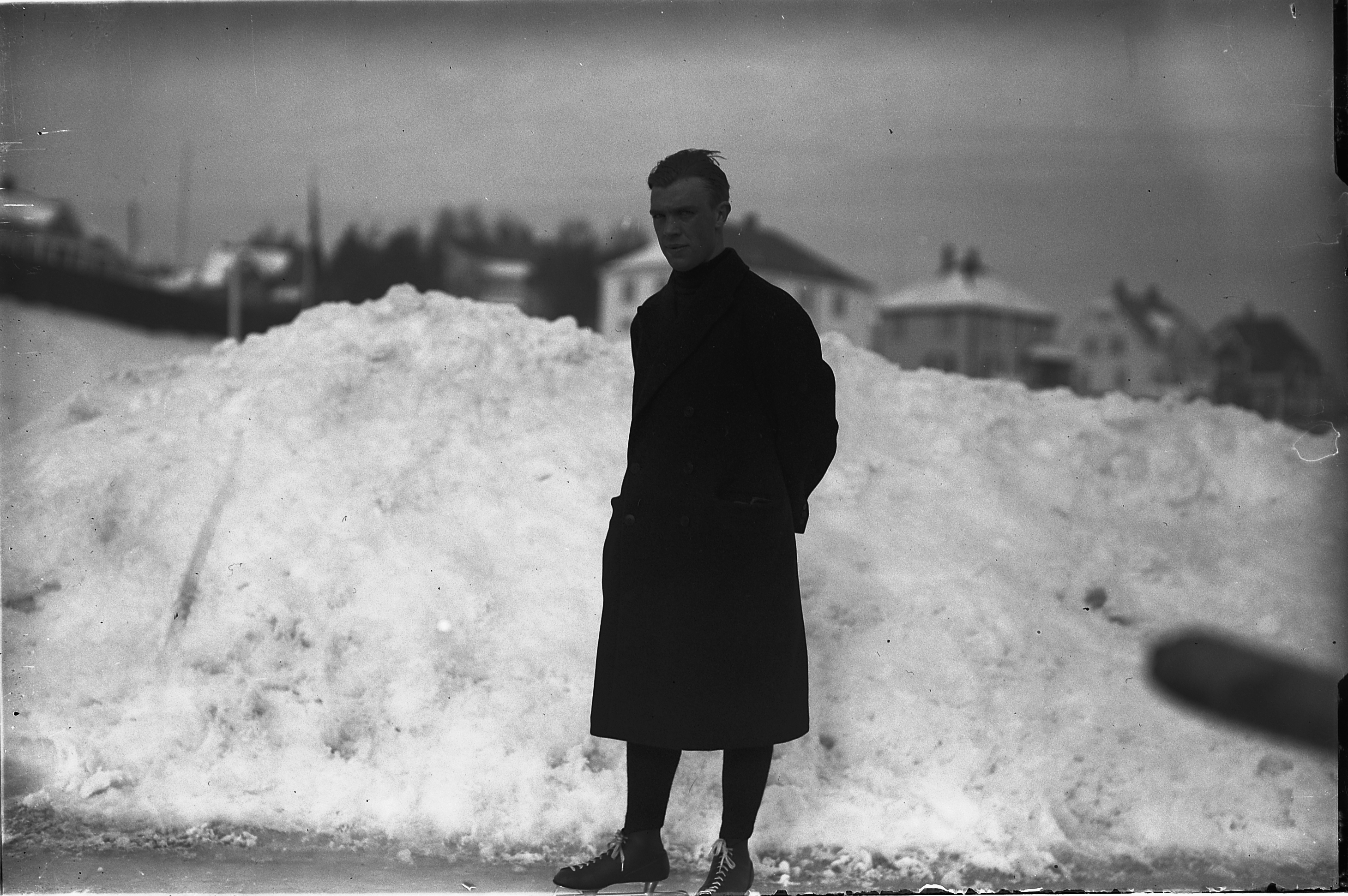 Skøyteløper ARMAND CARLSEN, HAMAR STADION